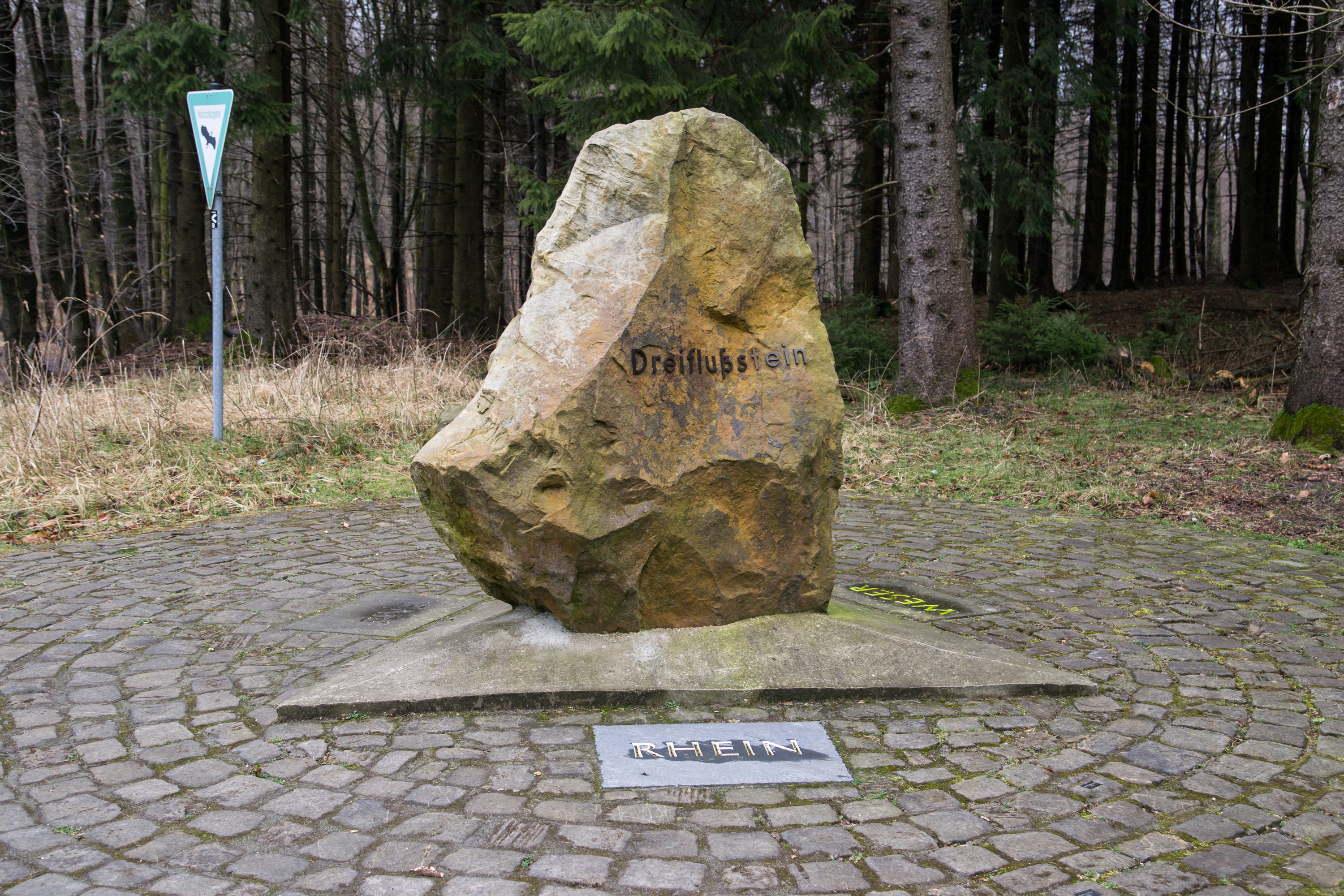 Dreiflussstein am Detmolder Klöppingsberg